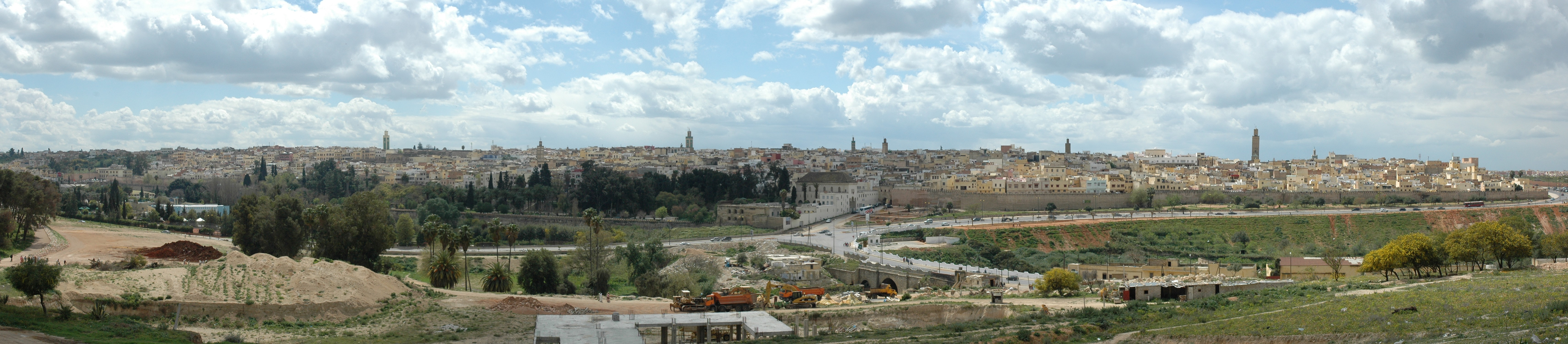 Panoràmica Meknès